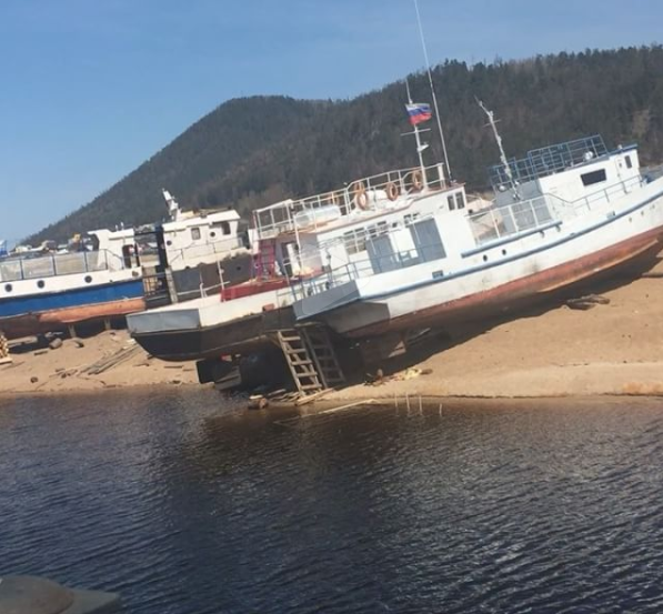 Рыболовные катера на берегу у села Турка